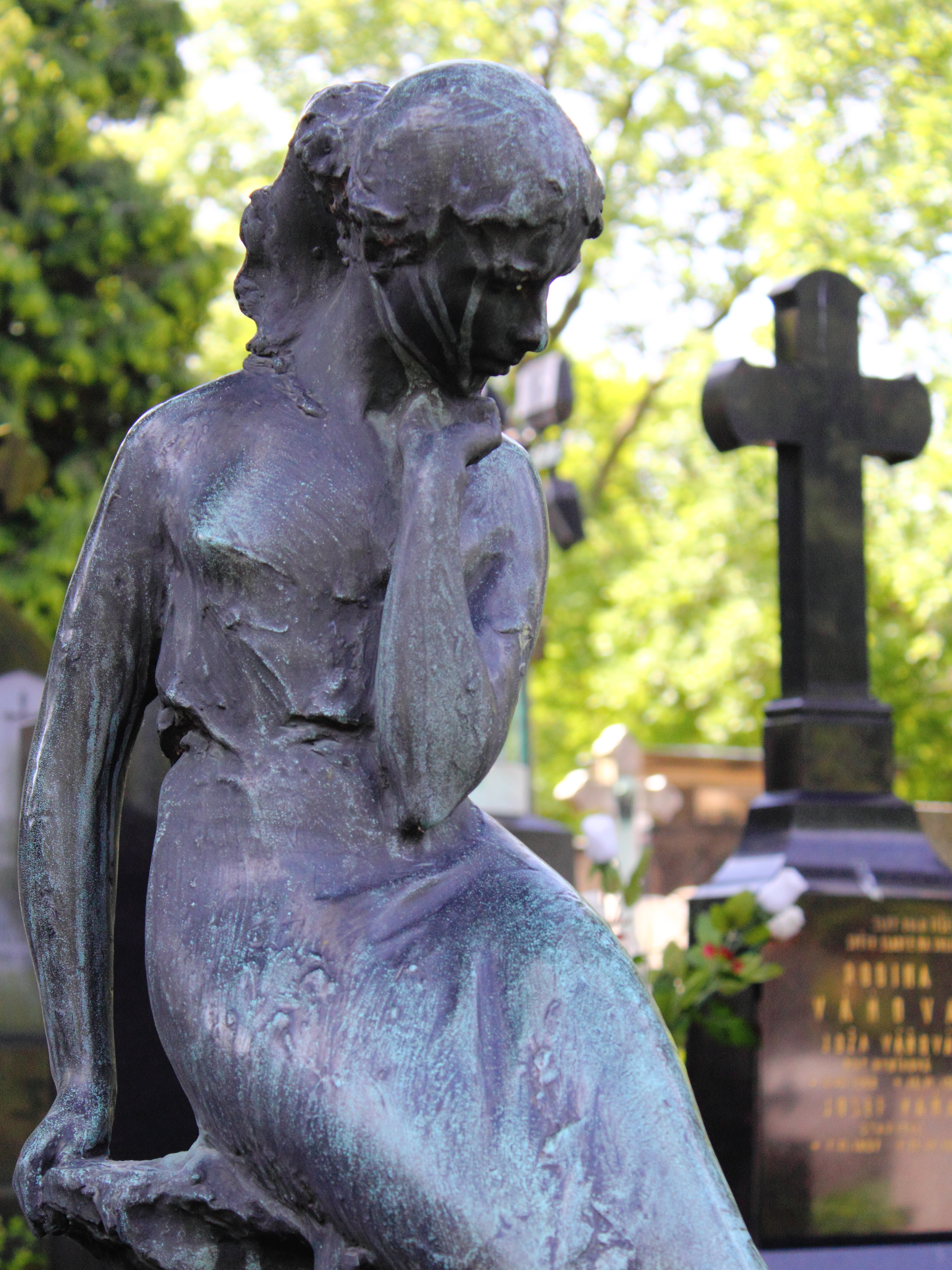 Plastika Jana Hány na hrobě Jany Rybářové, vyšehradský hřbitov (1957)